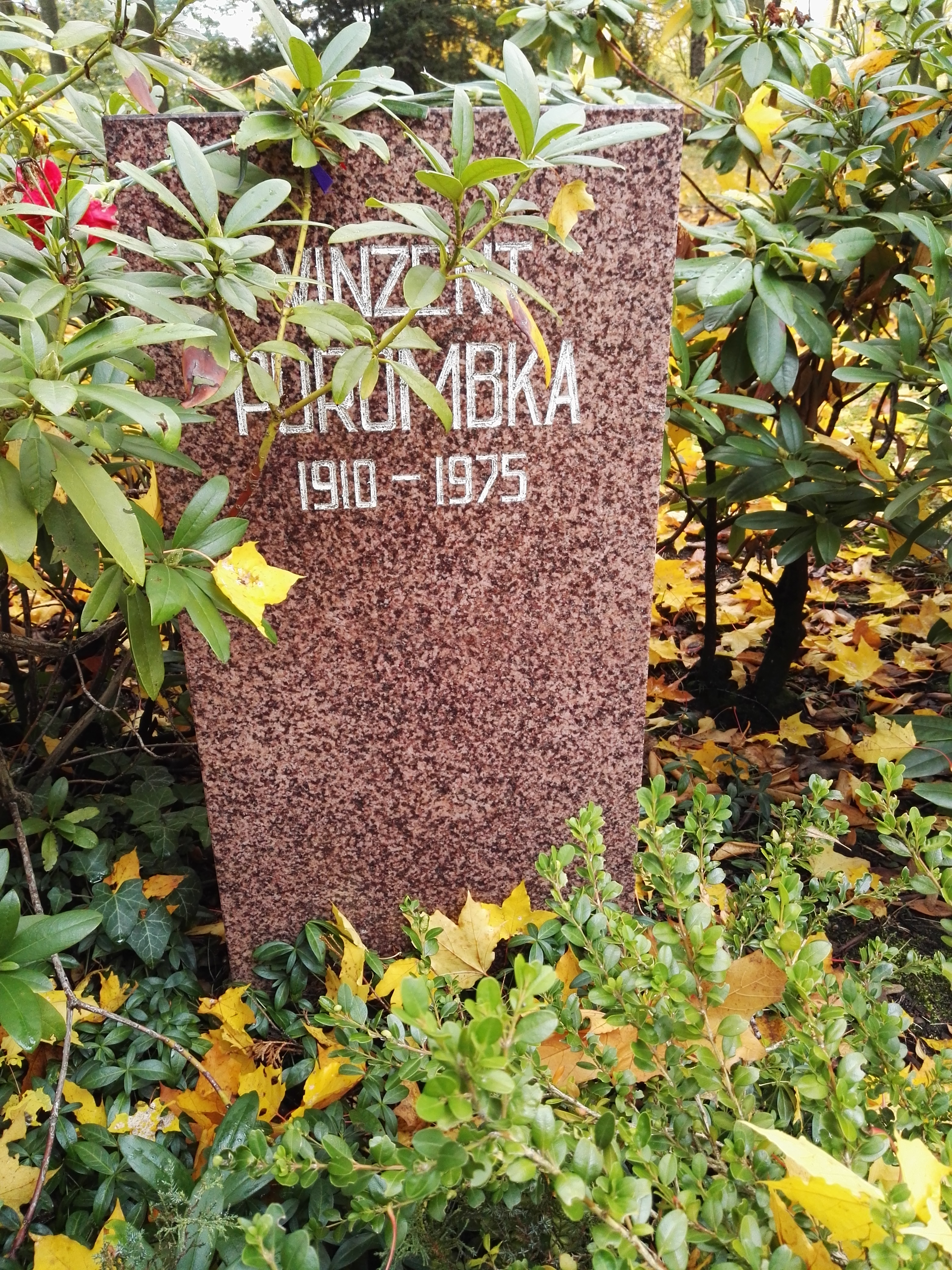 Grab von Vinzent Porombka auf dem Sozialistenfriedhof des Zentralfriedhofs Friedrichsfelde